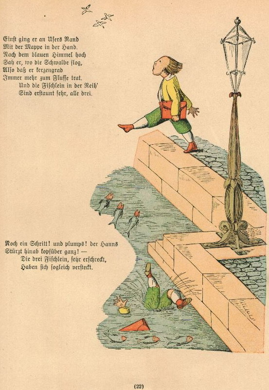 Der Struwwelpeter: Die Geschichte vom Hanns Guck-in-die-Luft Tafel 2